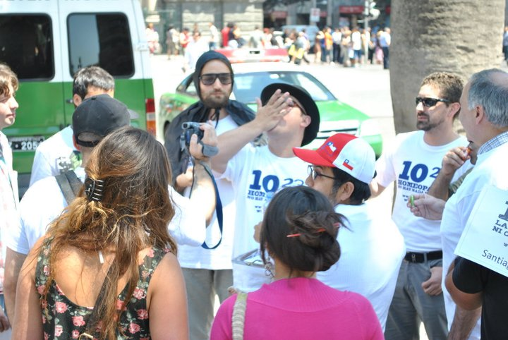 Suicidio homeopático 2011 en Santiago de Chile, cometido por integrantes de AECH.